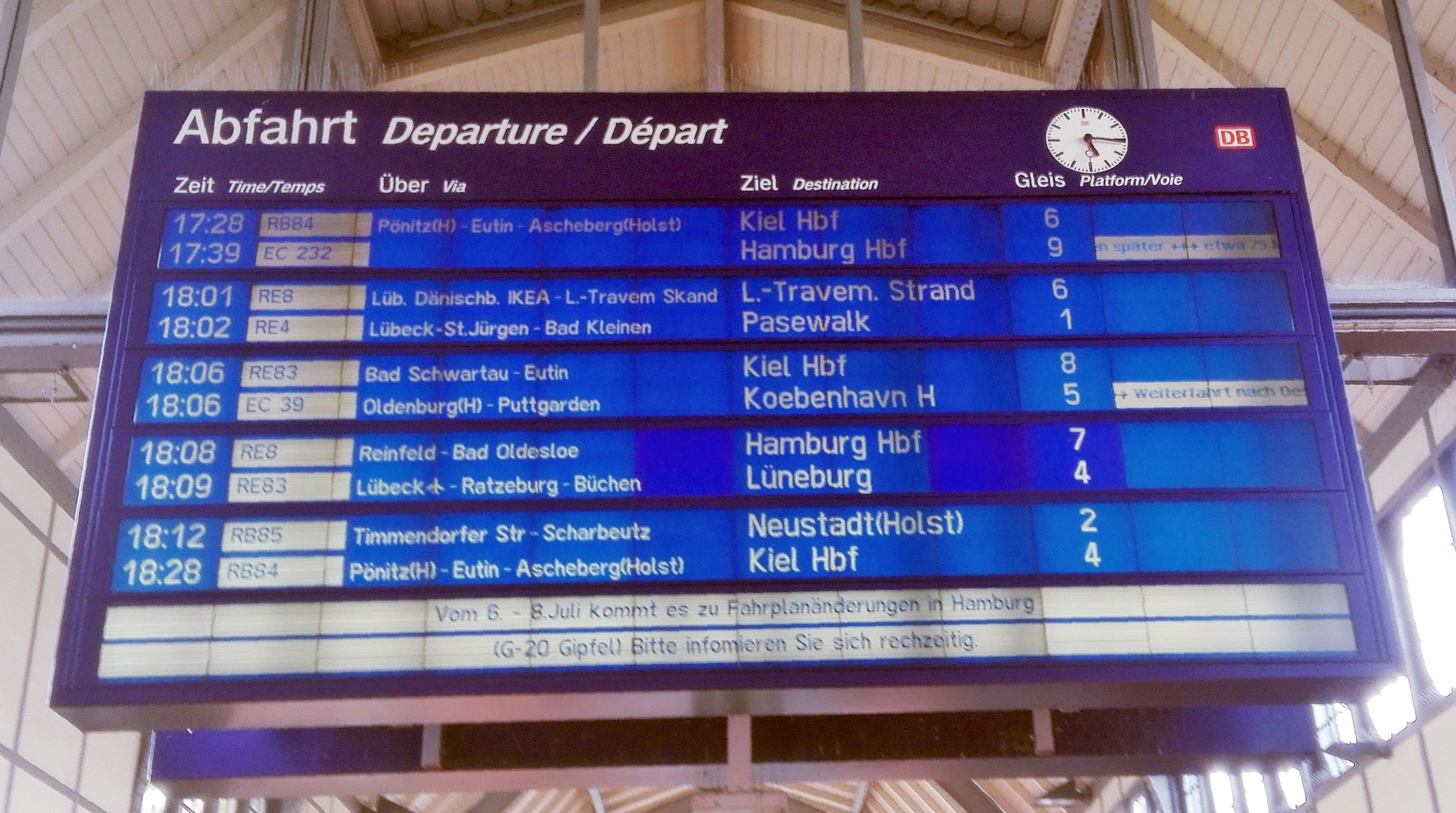 Zentrale doppelseitige Zugabfahrtstafel im Personensteg.